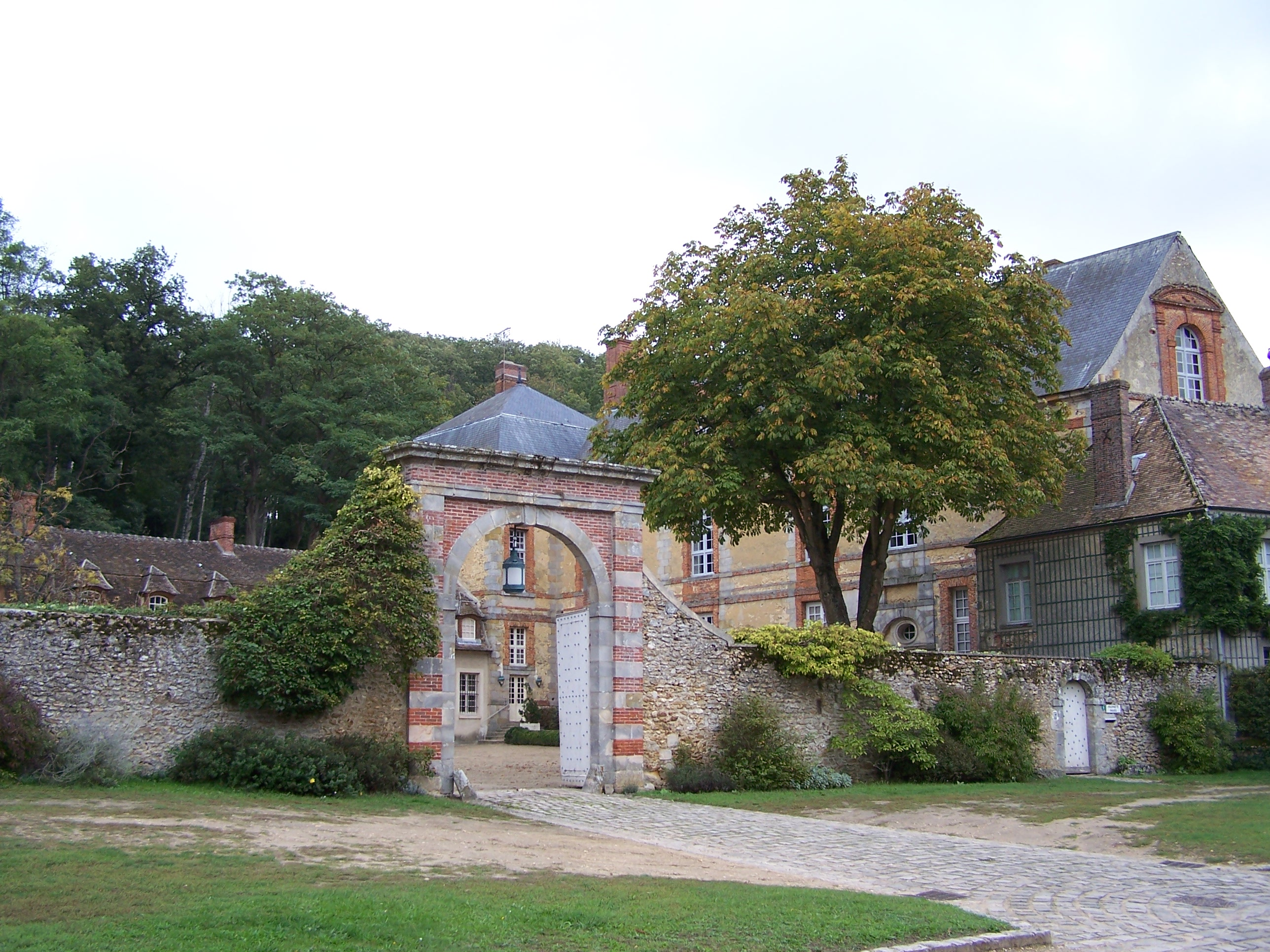 Château de La Celle-les-Bordes (Yvelines, France)